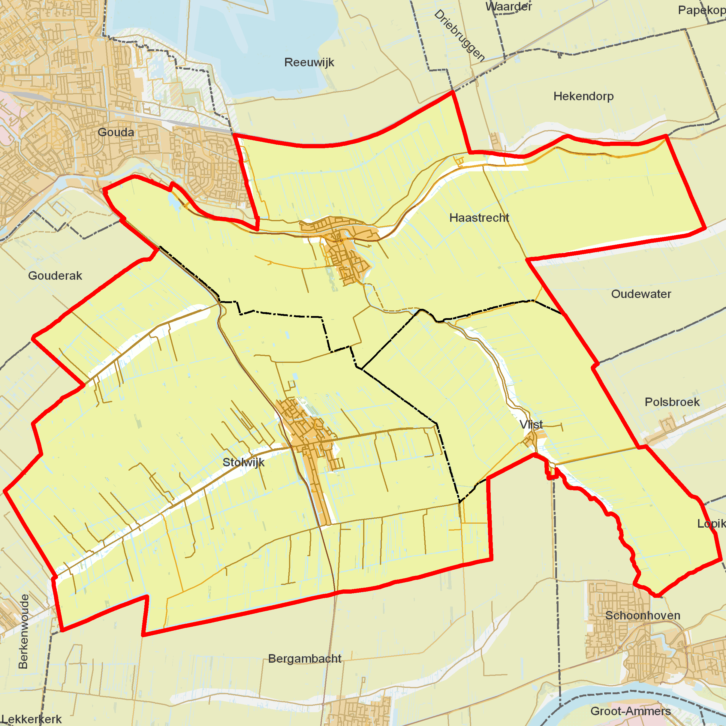 BAG woonplaatsen - Gemeente Vlist.png